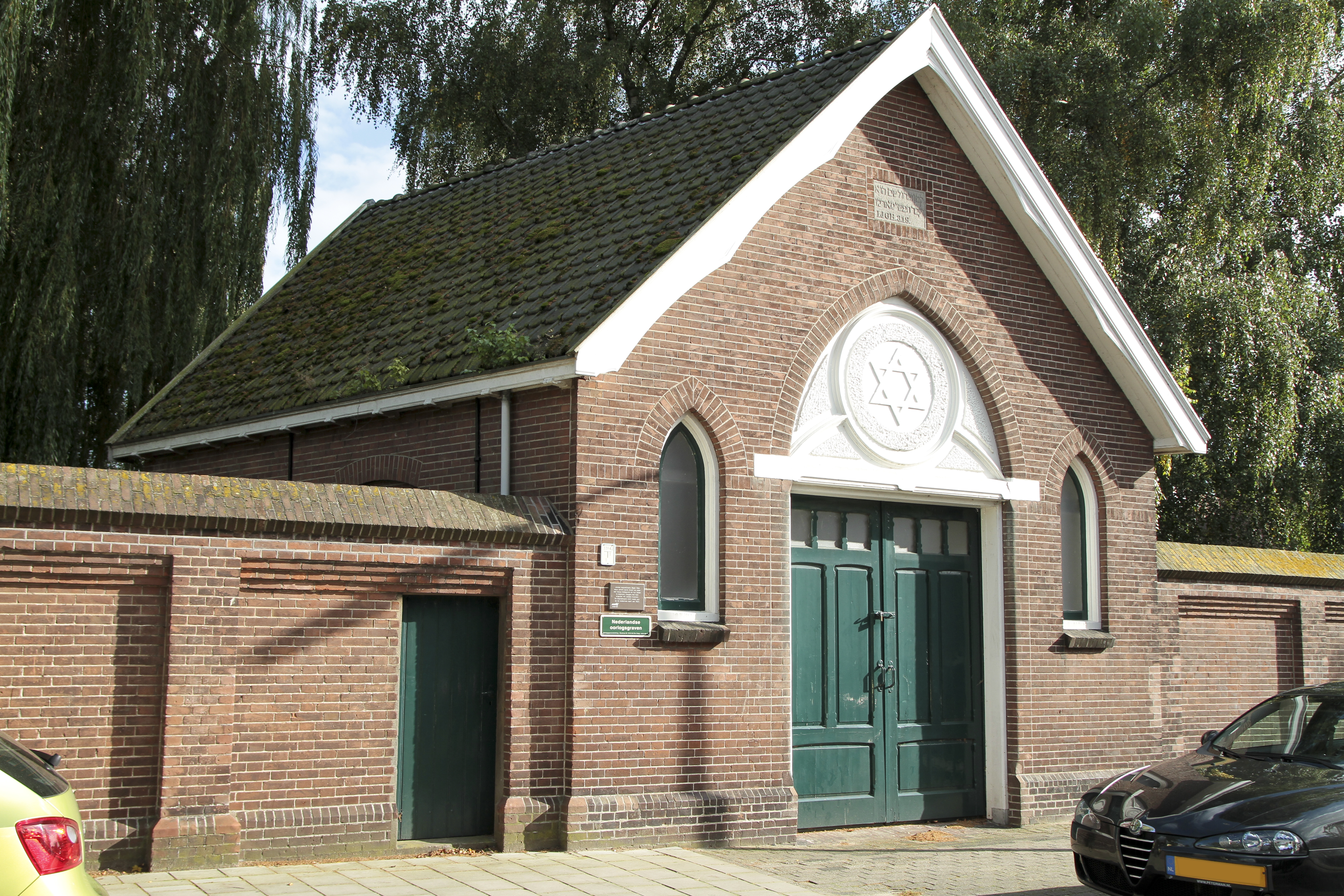 Joods Kerkhof aan de Dennenbosweg te Hengelo. Begin 19e eeuw schonk Baron Mulert de joden een stukje heidegrond waarop zij hun doden konden begraven. Hengelo had toen ongeveer 40 joodse inwoners. Dit kerkhof komt reeds voor op de kadastrale atlas van 1821.